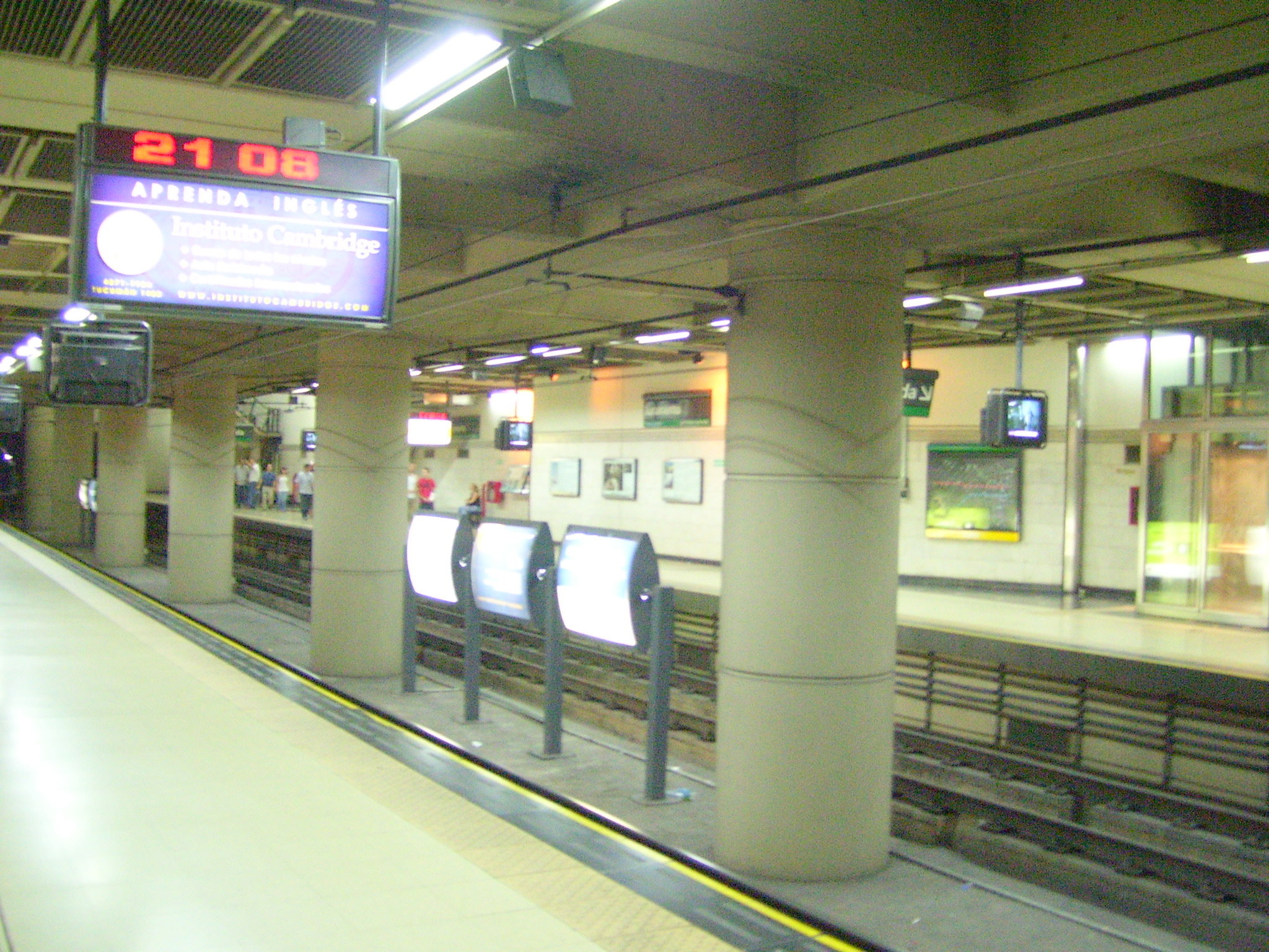 Estacion Juramento. Buenos Aires, Argentina